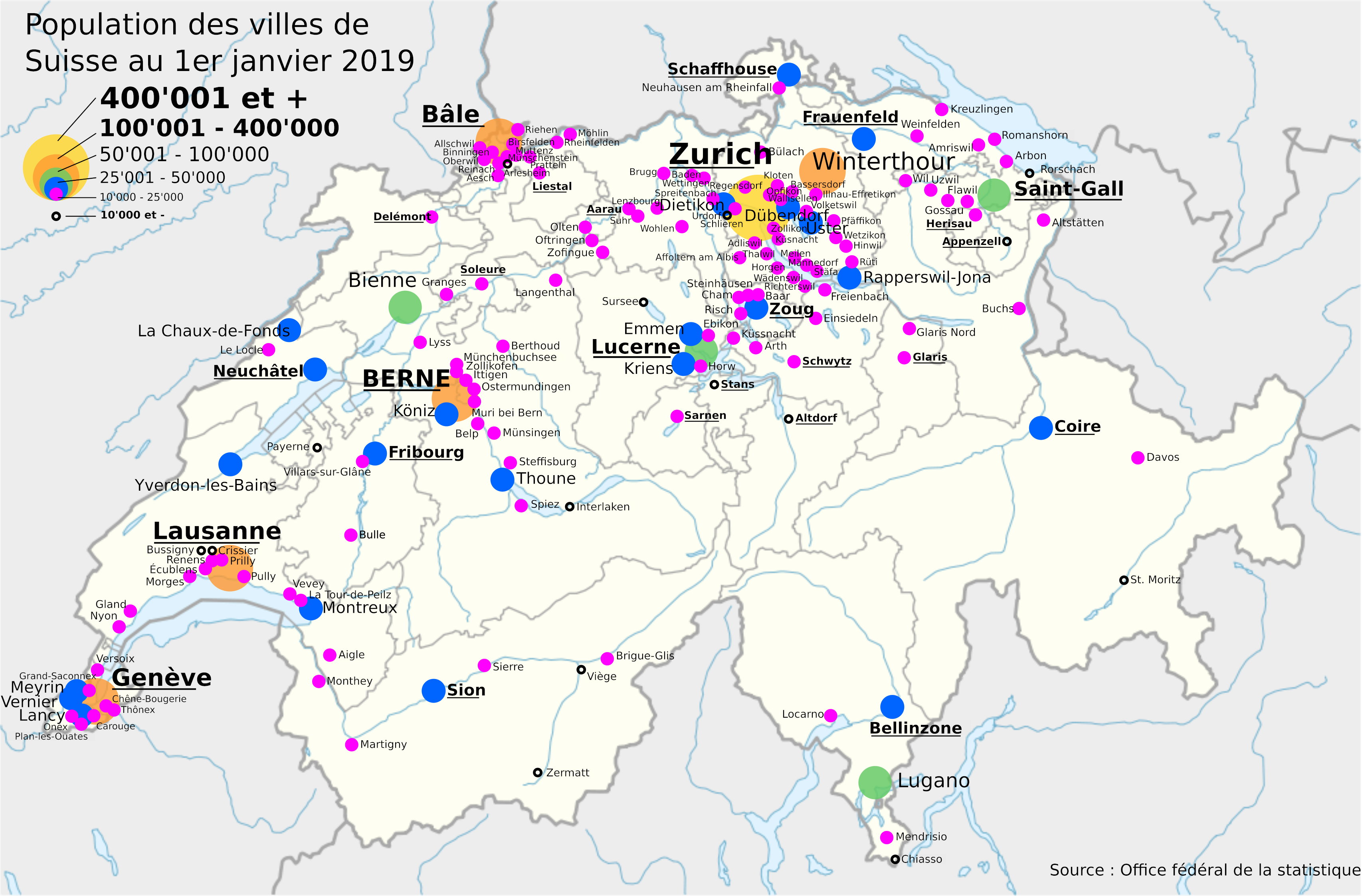 Distribution géographique des villes de Suisse selon la population au 1er janvier 2011. Carte de fond : File:Switzerland location map.svg Textes : en français